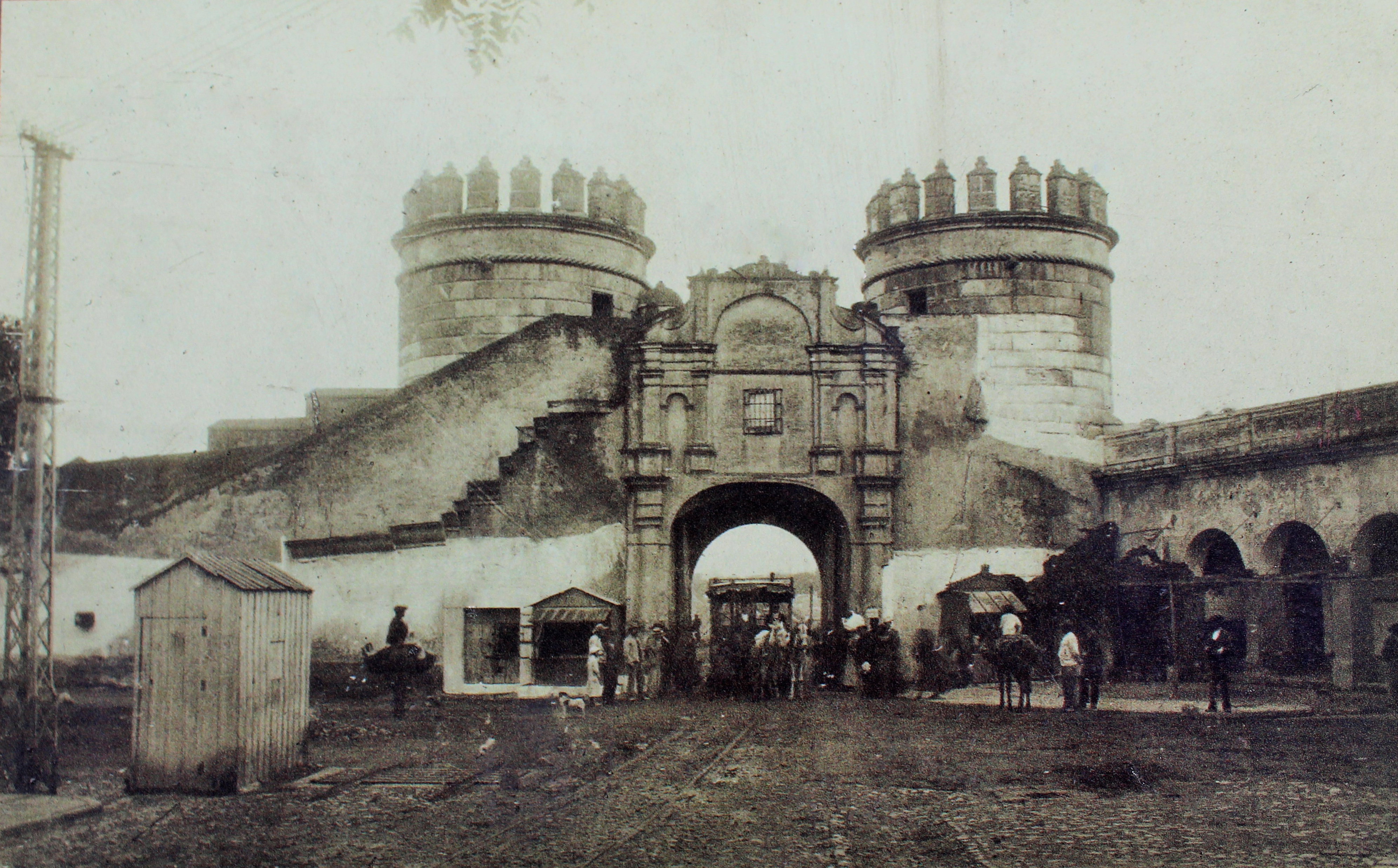 Badajoz, Puerta de Palmas. Imagen de 1903.